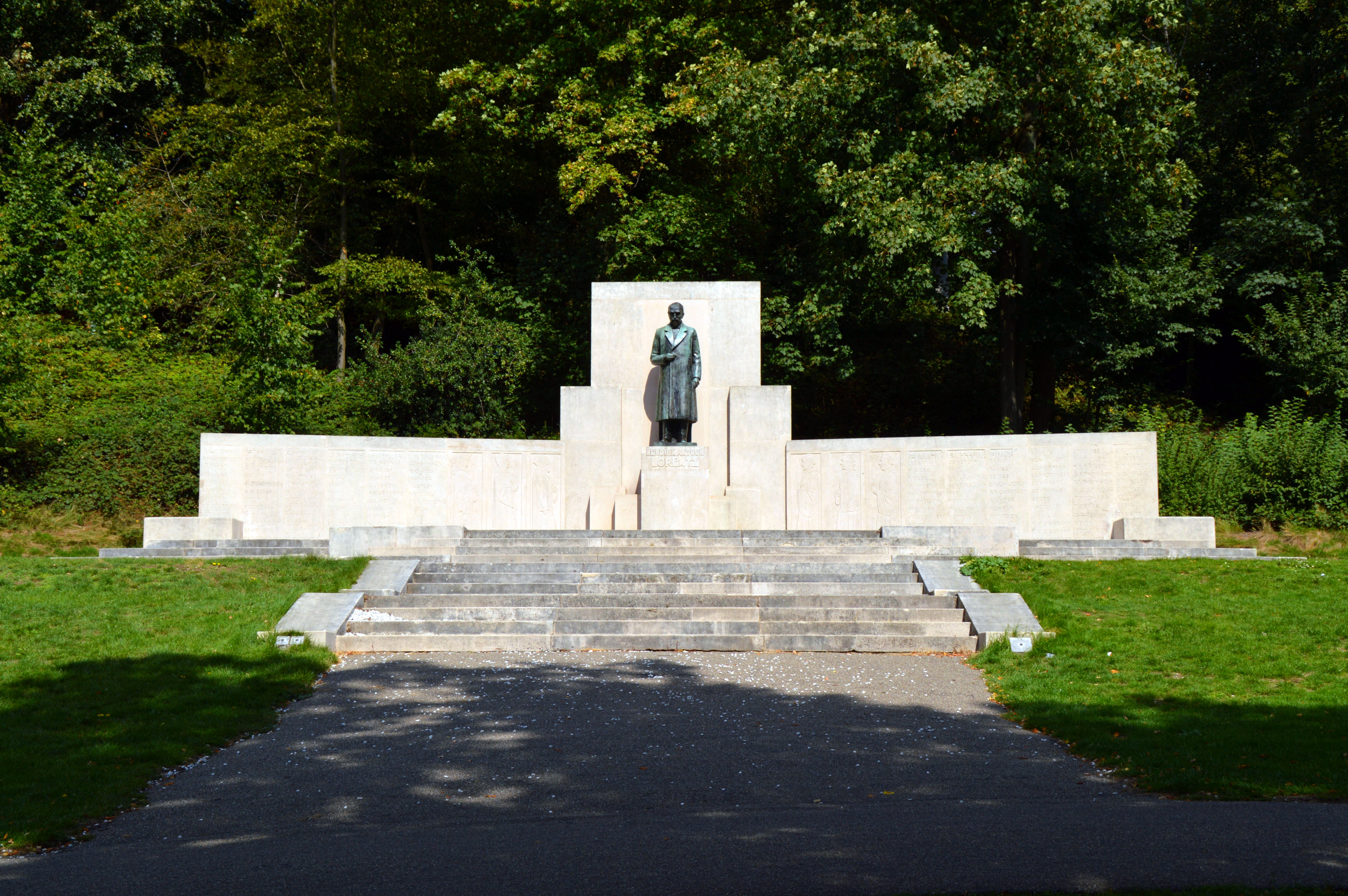 Lorentz-monument Park sonsbeek Arnhem Nederland, Netherlands Hendrik Antoon Lorentz Ludwig Oswald Wenckebach.